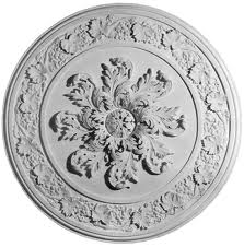 Акант